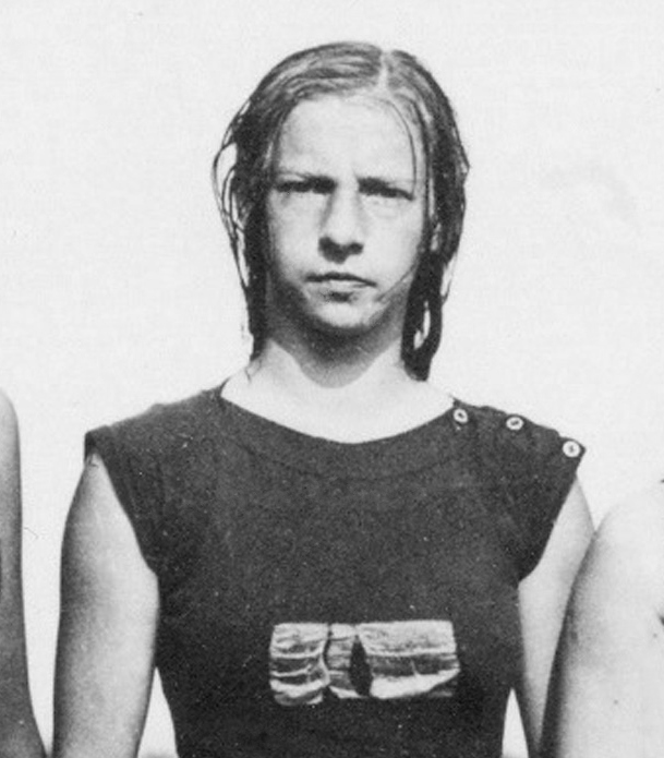 Dagmar Nilsson